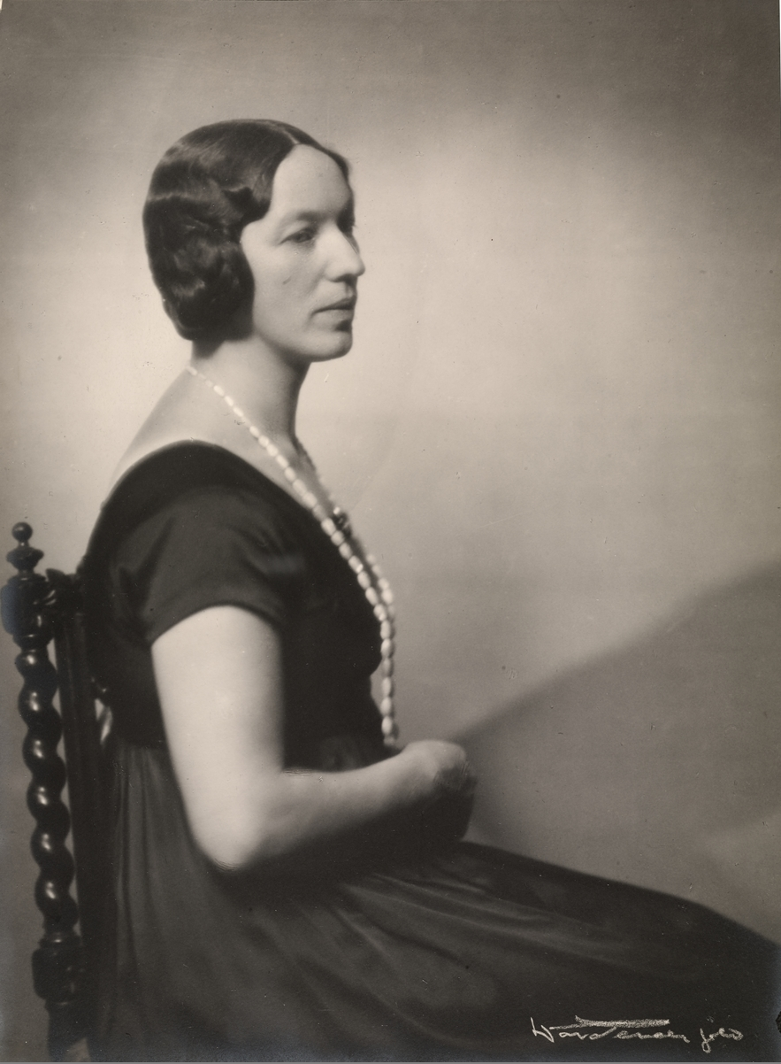 Ingeborg Refling Hagen. Foto: Thorleif Wardenær, ca. 1935. Fra Byhistorisk samling hos Oslo Museum.